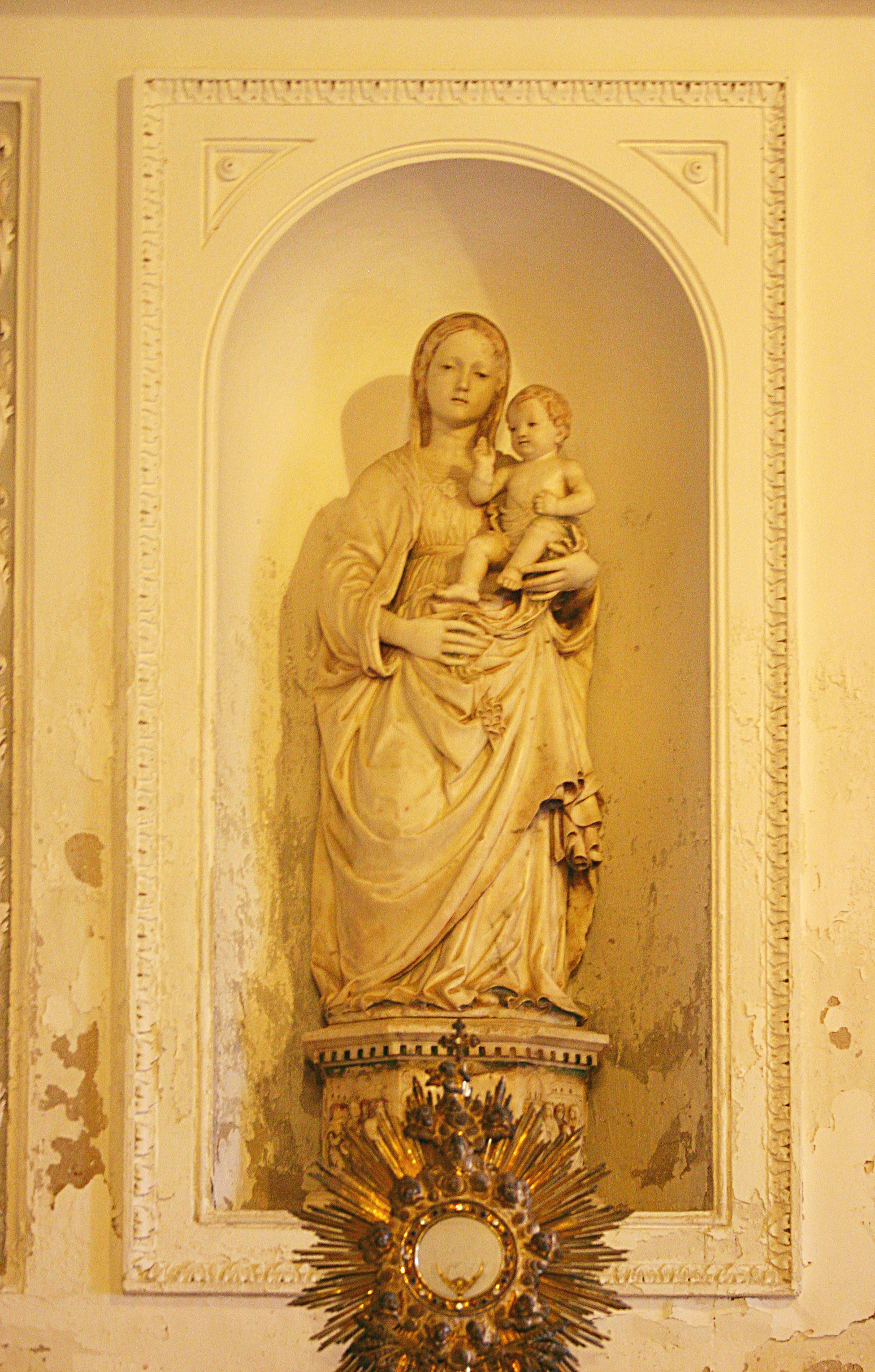 Cathedral of Palermo